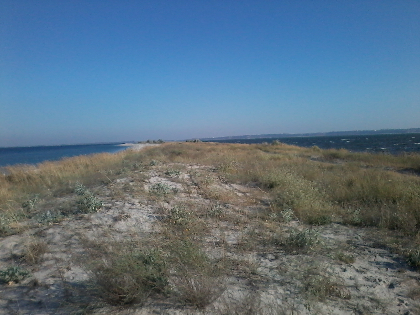 Кінцева ділянка Кінбурнської коси, де видно як Дніпро з П.Бугом (праворуч) вливаються у Чорне море